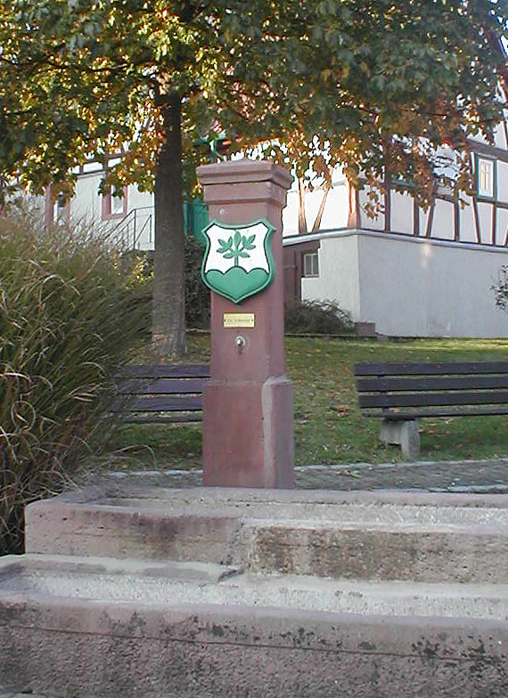 Brunnensäule des Dorfbrunnens mit ehemaligem Reichenbucher Gemeindewappen in Mosbach-Reichenbuch, Baden-Württemberg, Deutschland